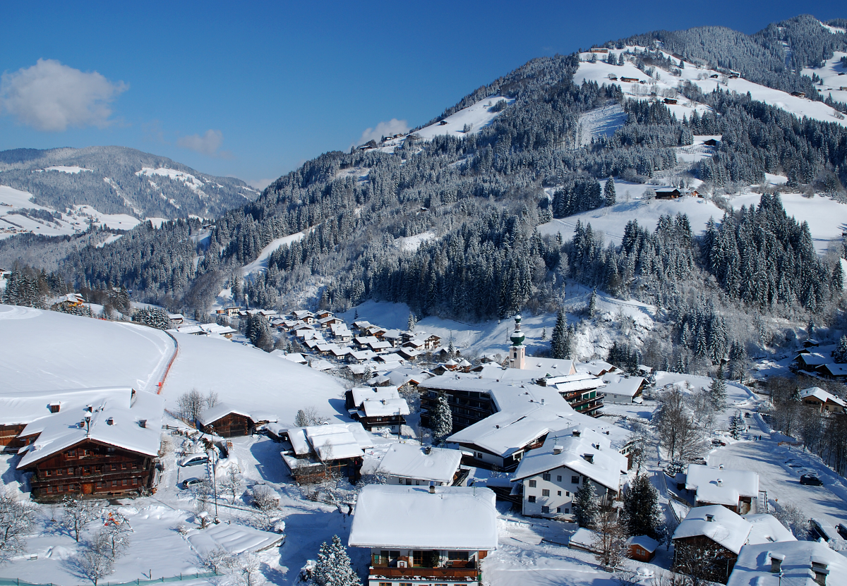 Auffach